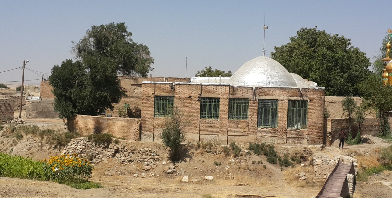 نمایی از امامزاده محمد جاپلق از سمت غرب